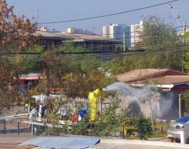 En el contexto de la Pandemia de enfermedad por coronavirus de 2020 y la declaración de cuarentena en la comuna de Pedro Aguirre Cerda, Chile, la comuna es limpiada con agentes desinfectantes